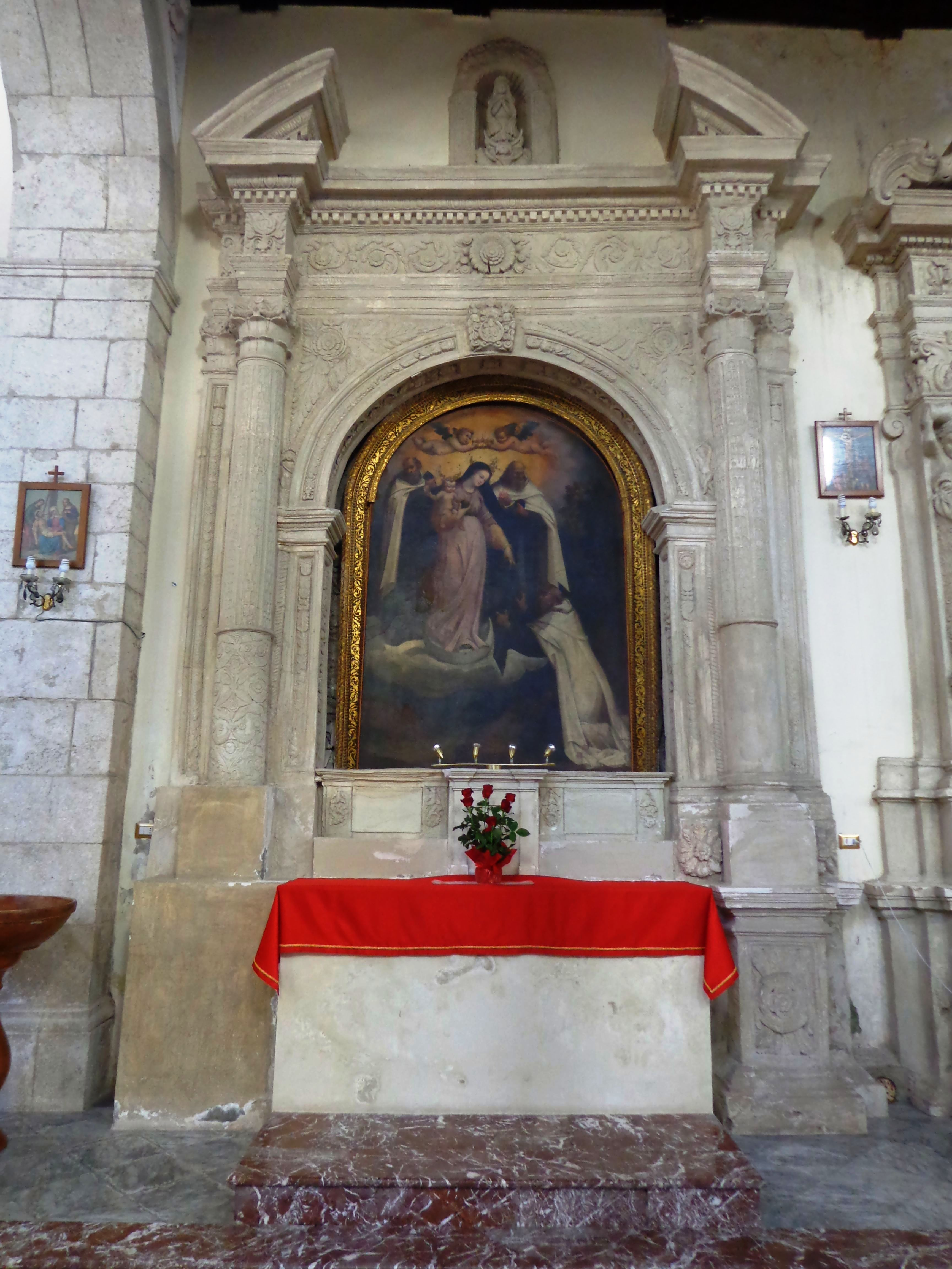 Duomo Condrò altare due